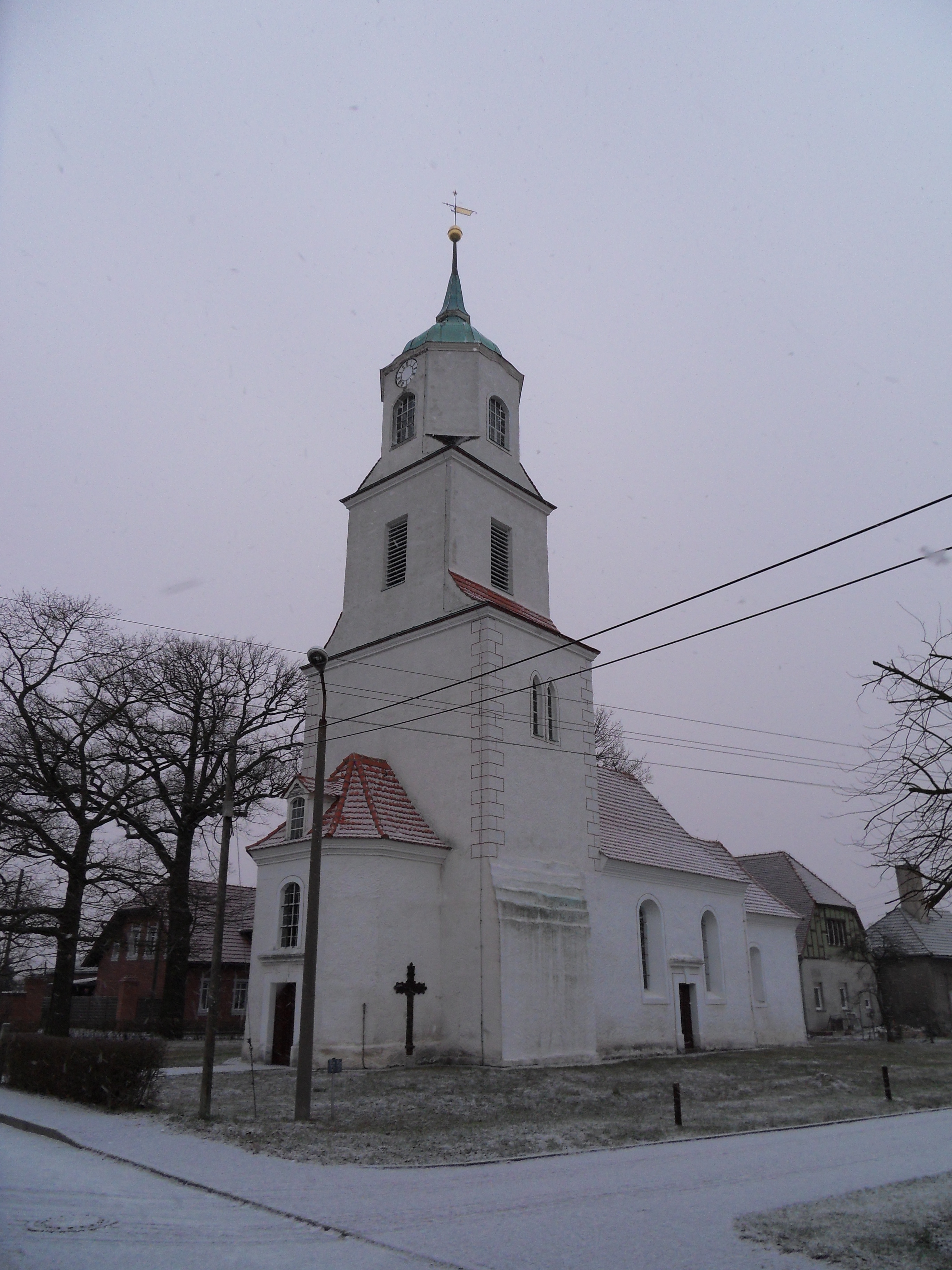 Dorfkirche in Stechau